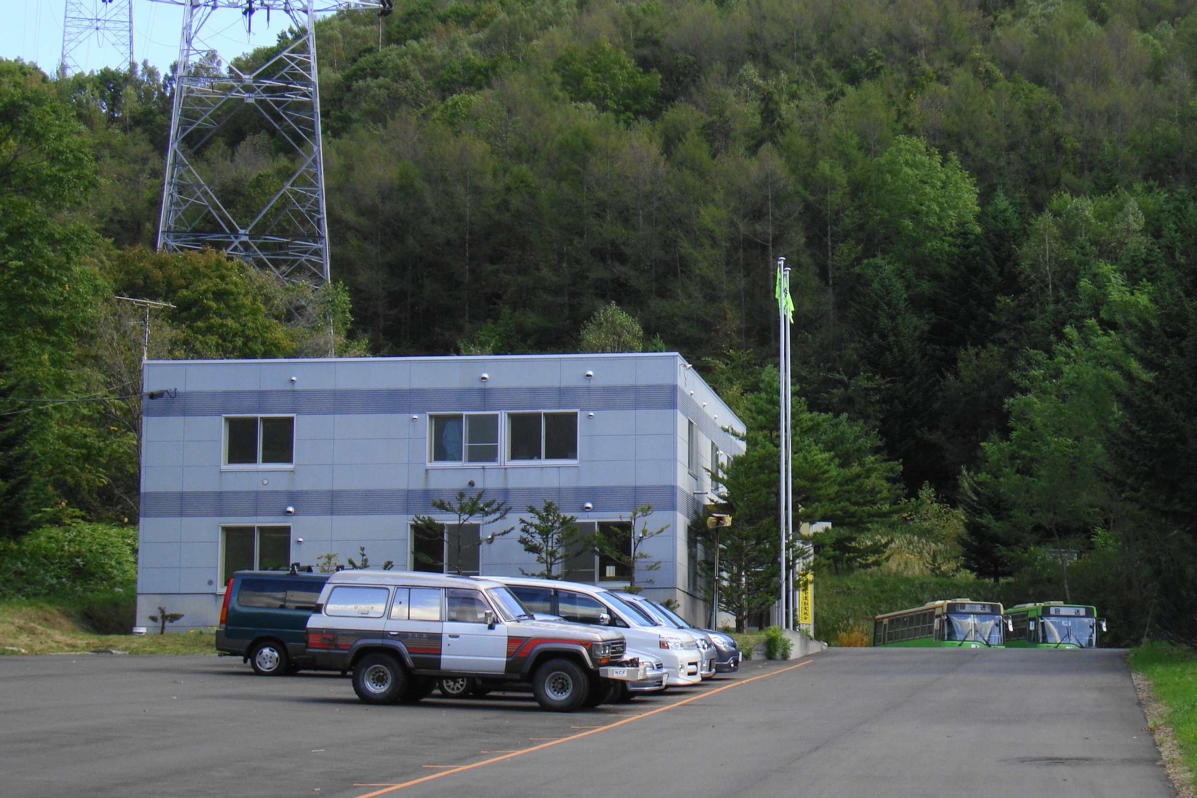 Main depot